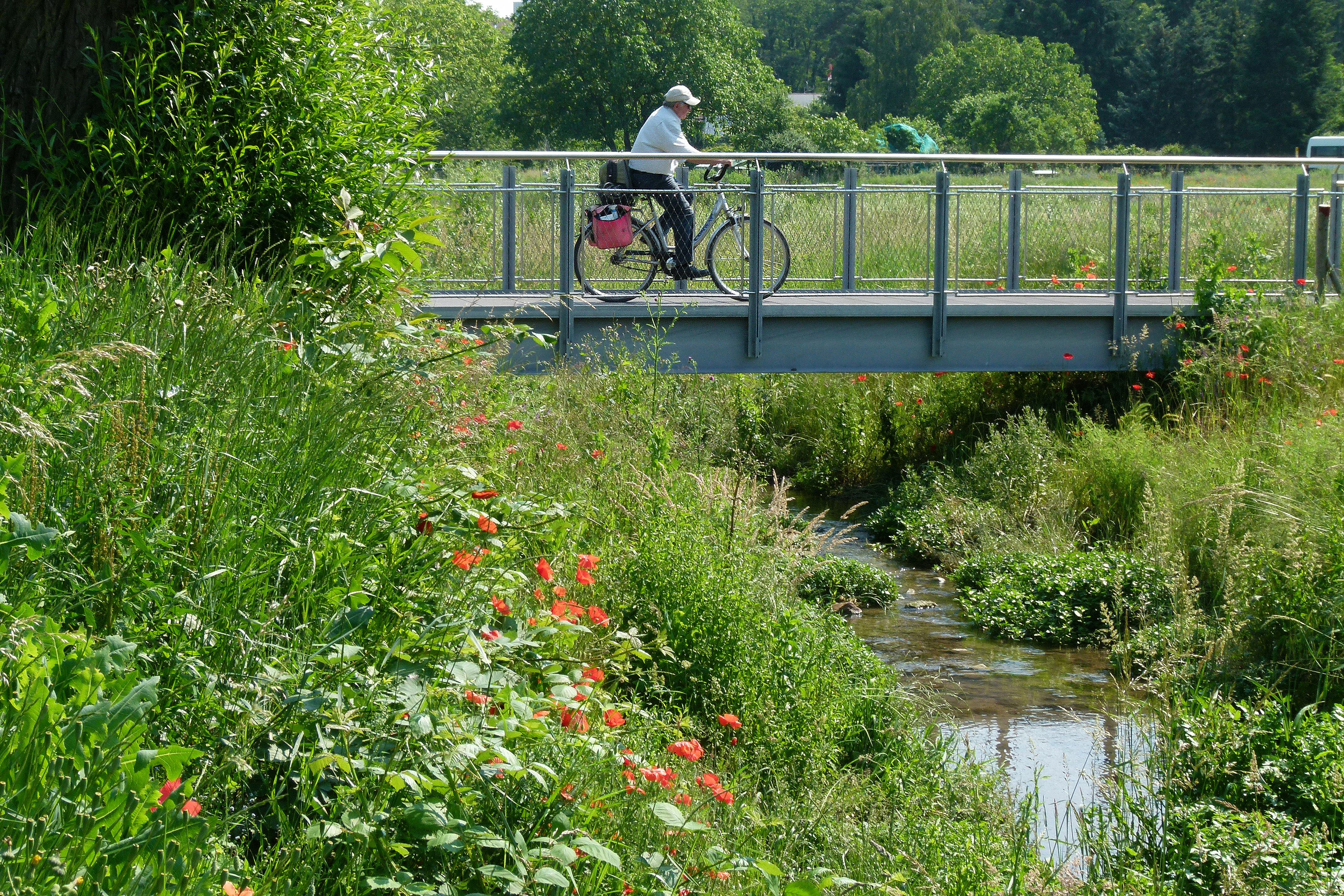 Ein Brückenübergang über den Gonsbach (Mainz) im Jahr 2016, zwei Jahre nach der Renaturierung (zwischen Mainzer Straße und dem Rückhaltebecken Lungenberg). Siehe zum Vergleich das Bild: Gonsbach bei Mainz 2014